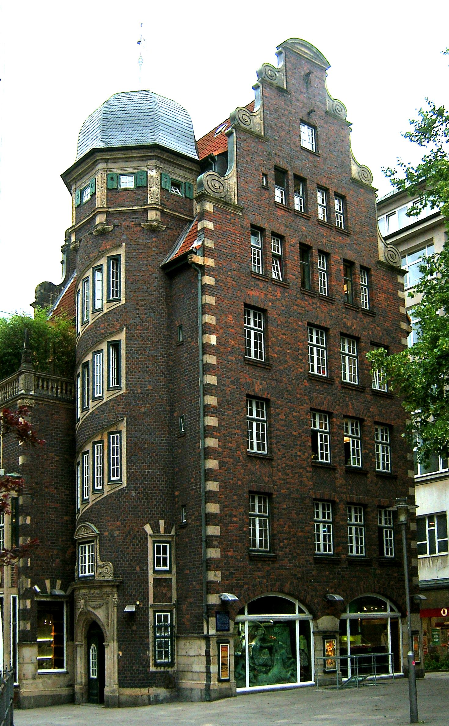 Das Hulbehaus in der Mönckebergstraße 21 in Hamburg-Altstadt wurde 1910/11 von Henry Grell erbaut. Es nimmt auf die hanseatische und die niederländische Renaissance um 1600 Bezug und wurde für den Kunstgewerbehändler Hulbe errichtet. This is the photograph of an architectural monument. It is part of the list of cultural monuments of Hamburg, no. 1784